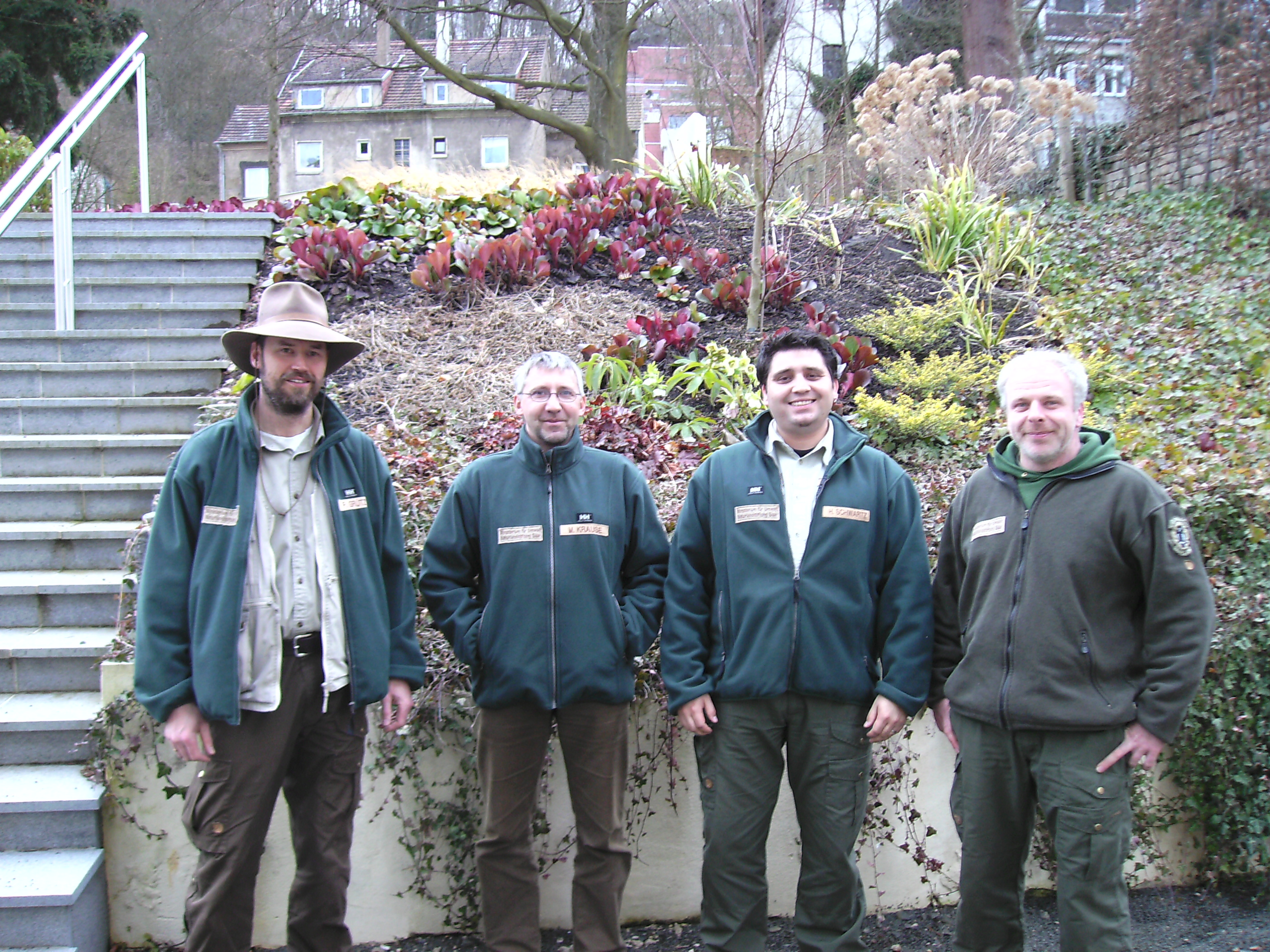 Naturwacht Saarland: Naturwächter ("Ranger")